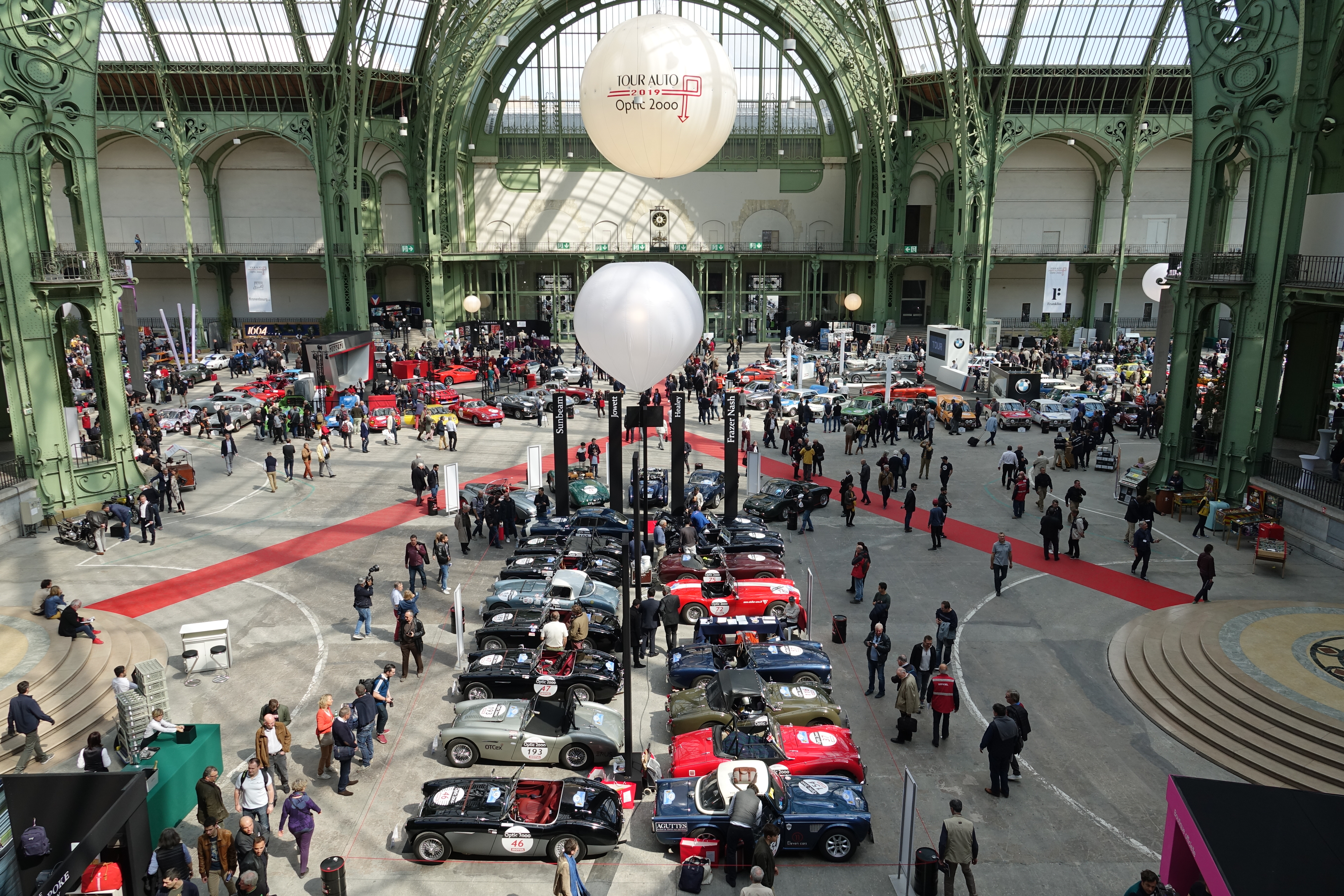 Tour Auto 2019 - Marques anglaises à l'honneur